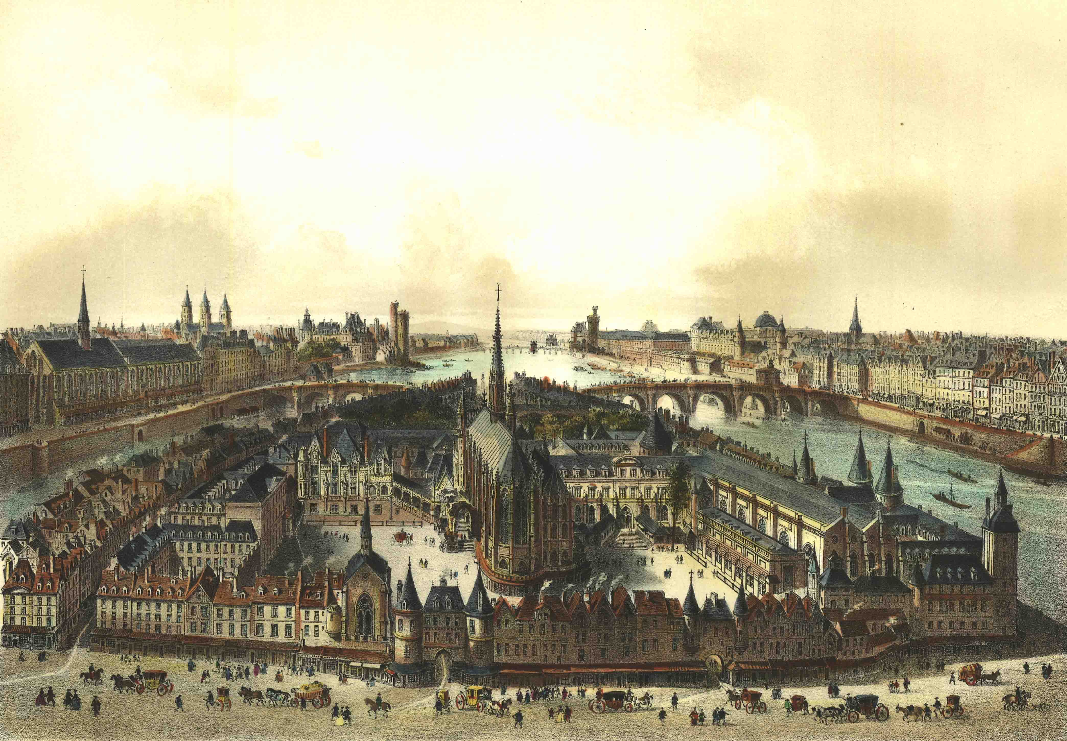 Israël Silvestre (Français, 1621-1691) d'après Jean Boisseau: Paris en 1650 - Palais de Justice et Seine, gravure coloriée, non datée (avant 1691).